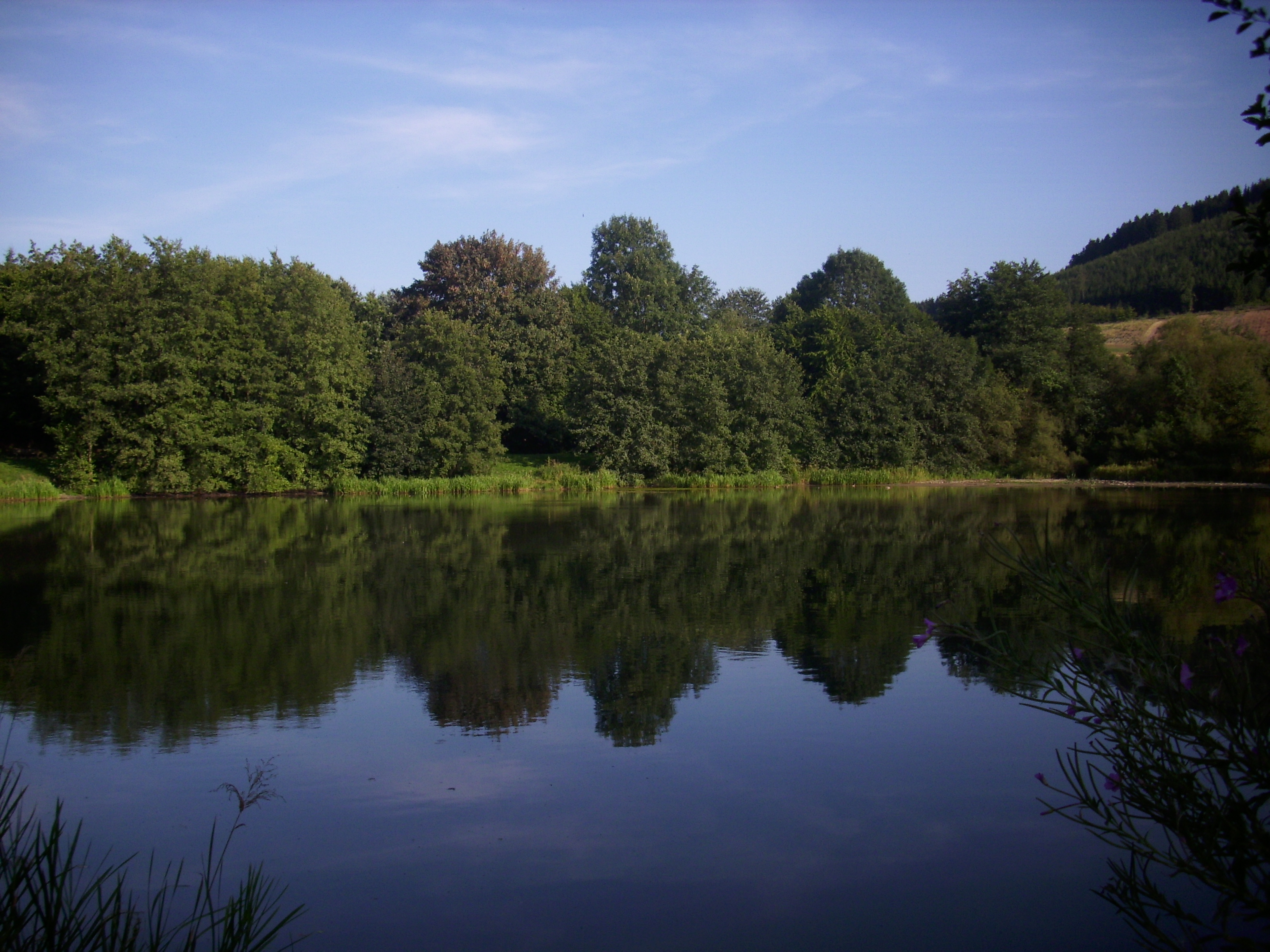 Der See in Bönkhausen.